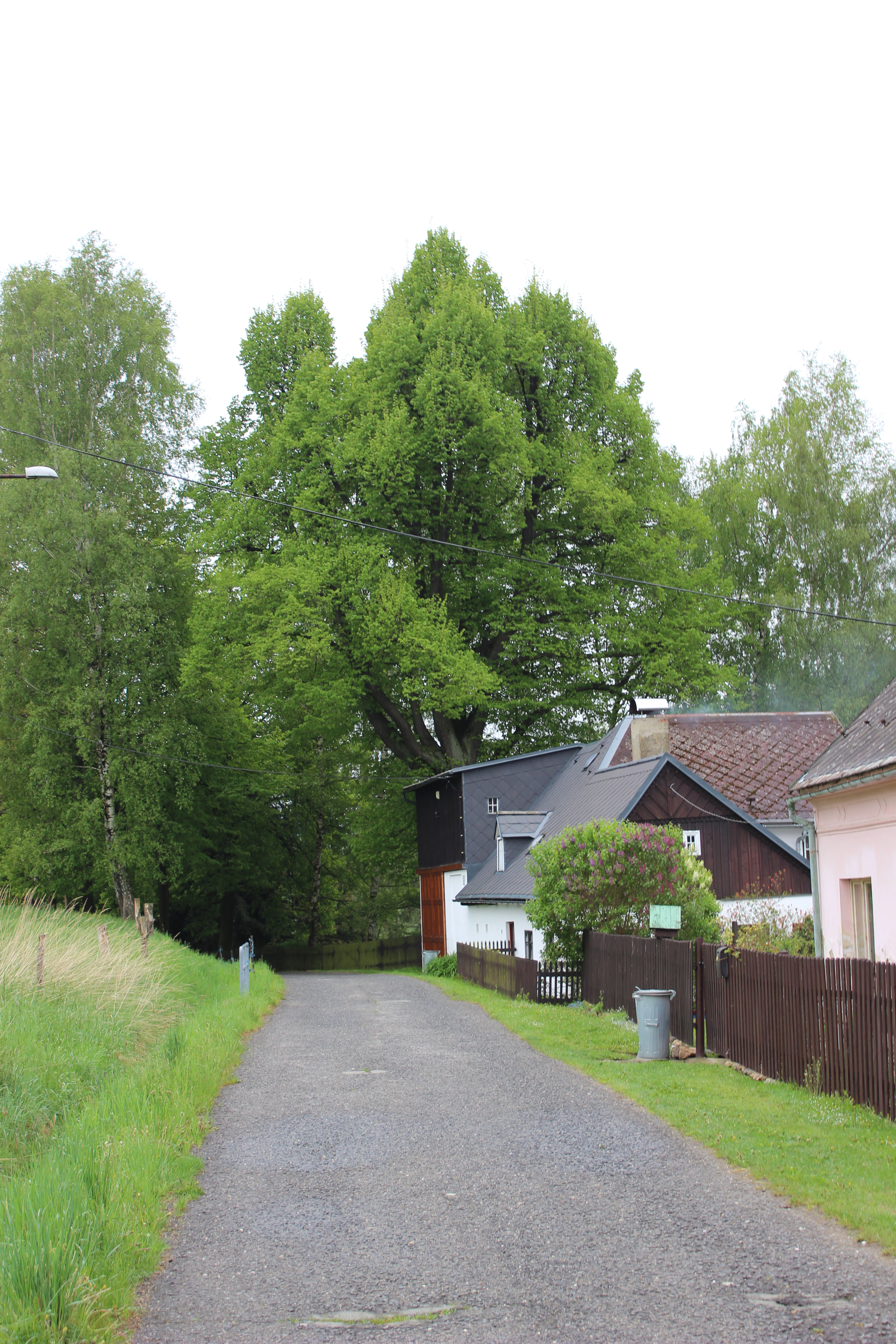 Lípa Filipova v Pekle, části Raspenavy. V popředí dům evidenční číslo 32.